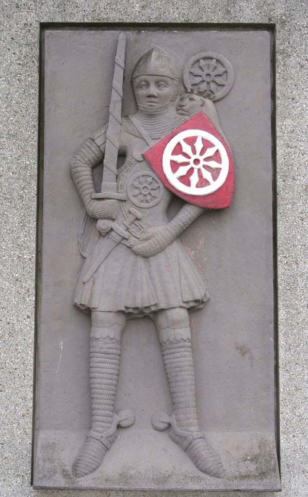 Abbildung des Mainzer Kurfürst - aus dem Skulpturenzyklus vom ehemaligen Kaufhaus "Am Brand", frühes 14.Jh (Nachbildung am Mainzer Rheinufer - Original im Landesmuseum Mainz)